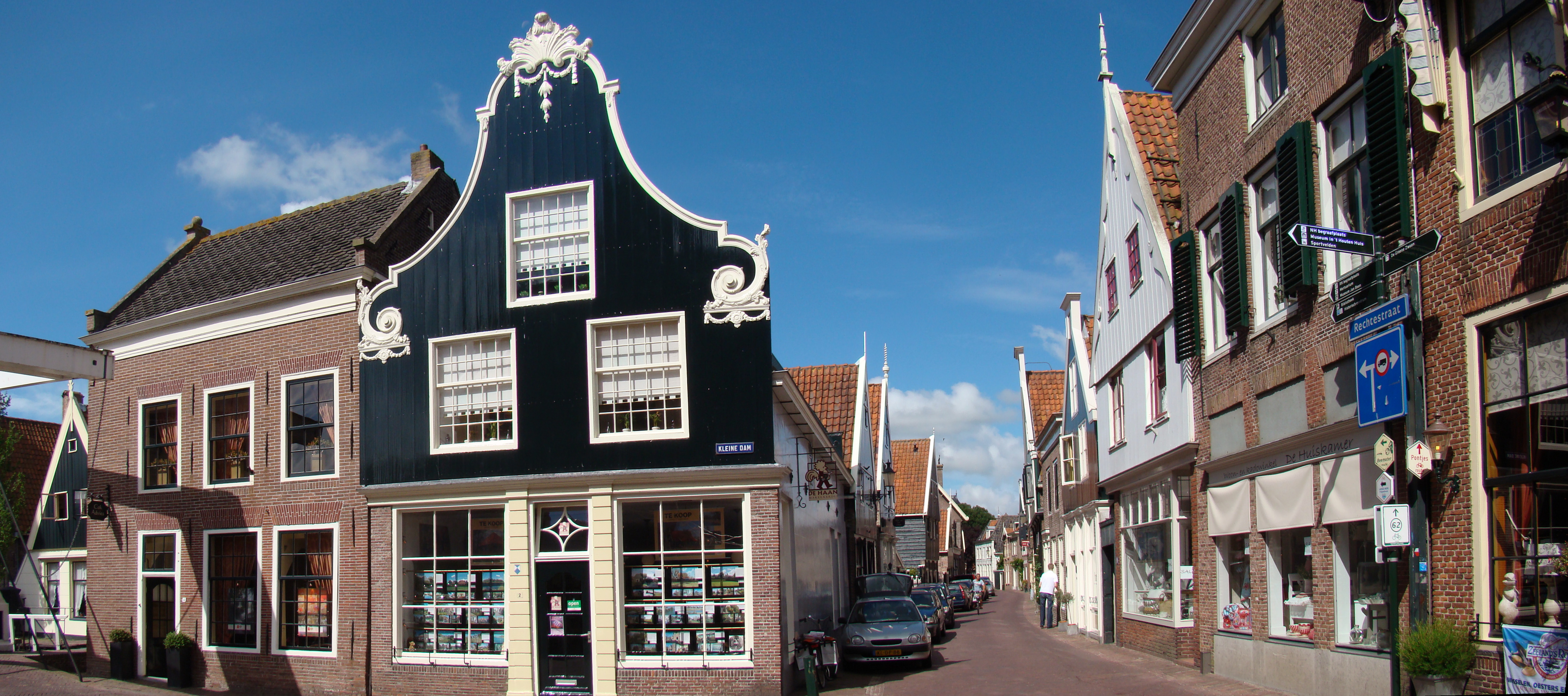 Rijksmonumenten in De Rijp, Monumental buildings in De Rijp, Netherlands